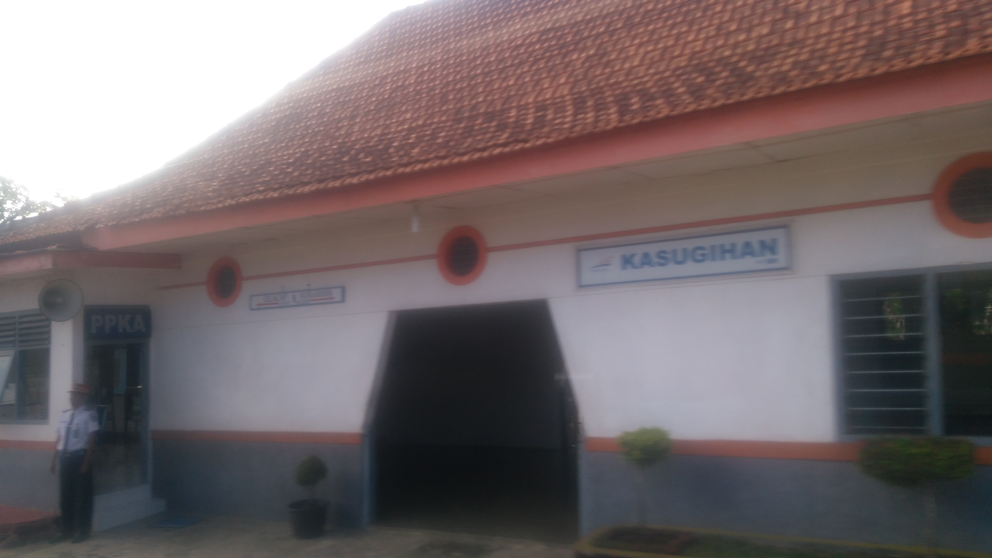 Bangunan utama dari Stasiun Kasugihan